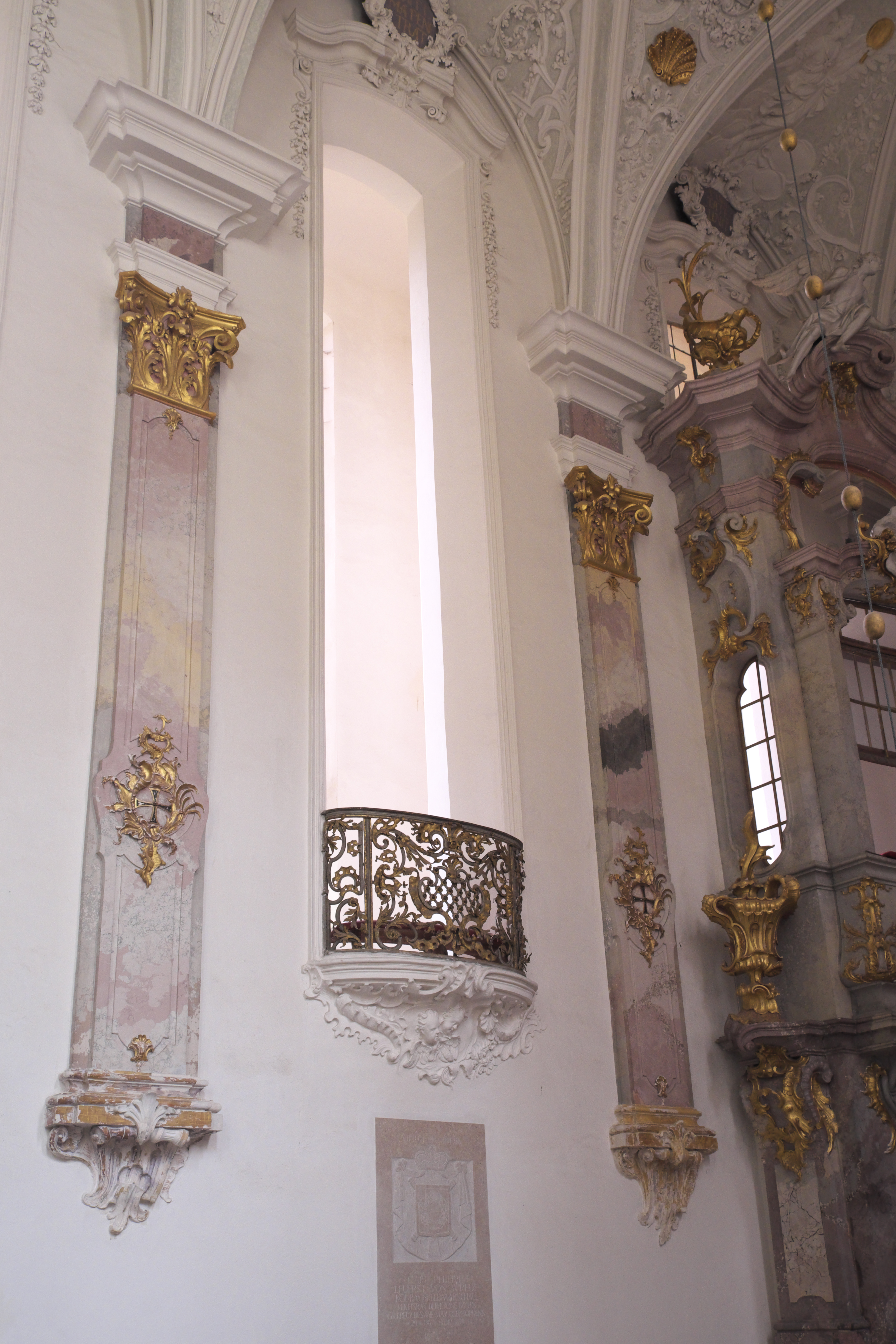 Schlosskirche des ehemaligen Deutschordensschlosses in Ellingen im Landkreis Weißenburg-Gunzenhausen (Mittelfranken/Bayern), Pilaster und Öffnung zum Umgang und den Oratorien im Chor